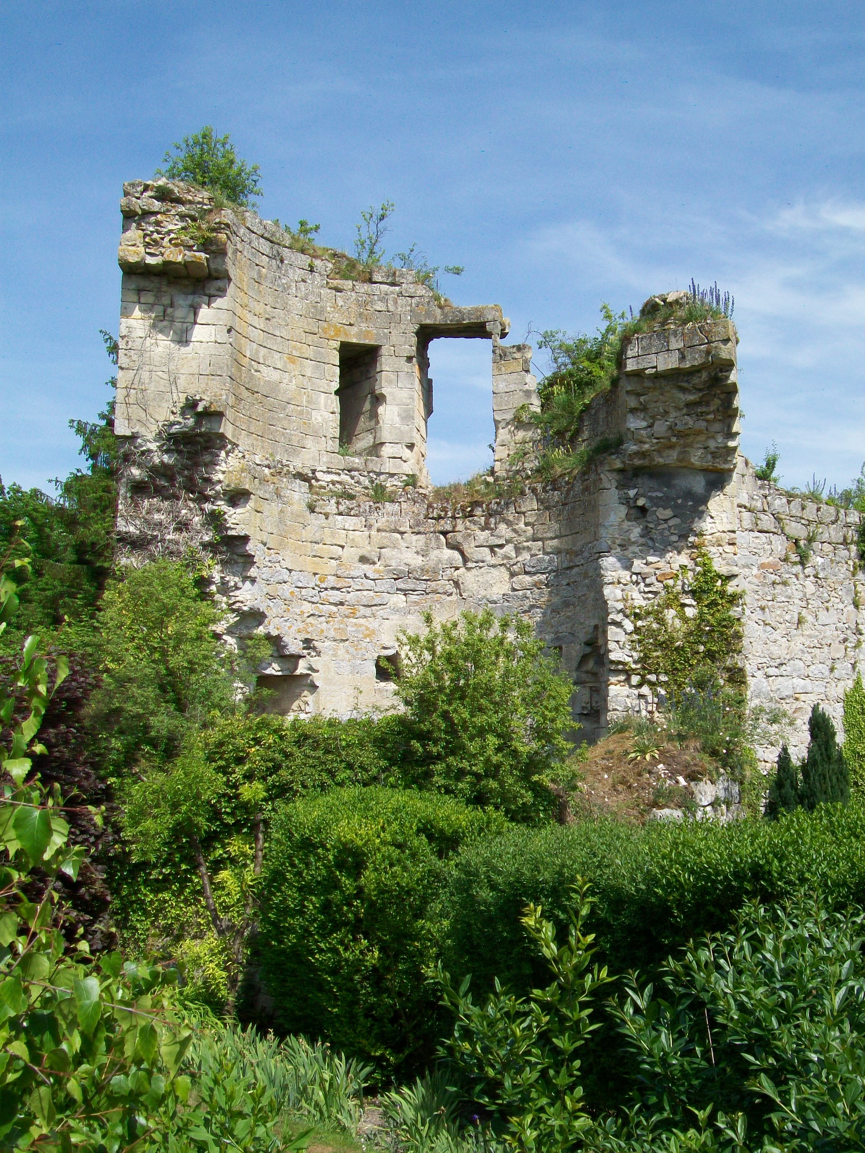 La tour d'angle sud-ouest de l'ancien château-fort.